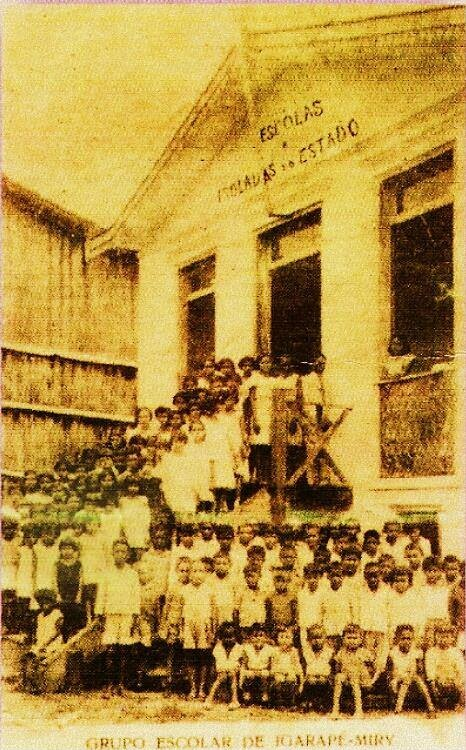 Grupo